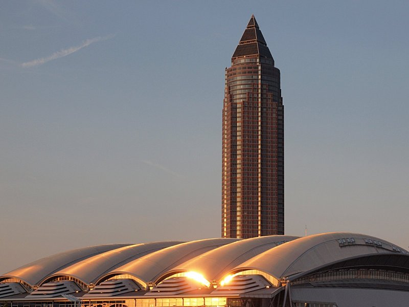 Der Frankfurter Messeturm von Westen aus über eine Halle des Messegeländes